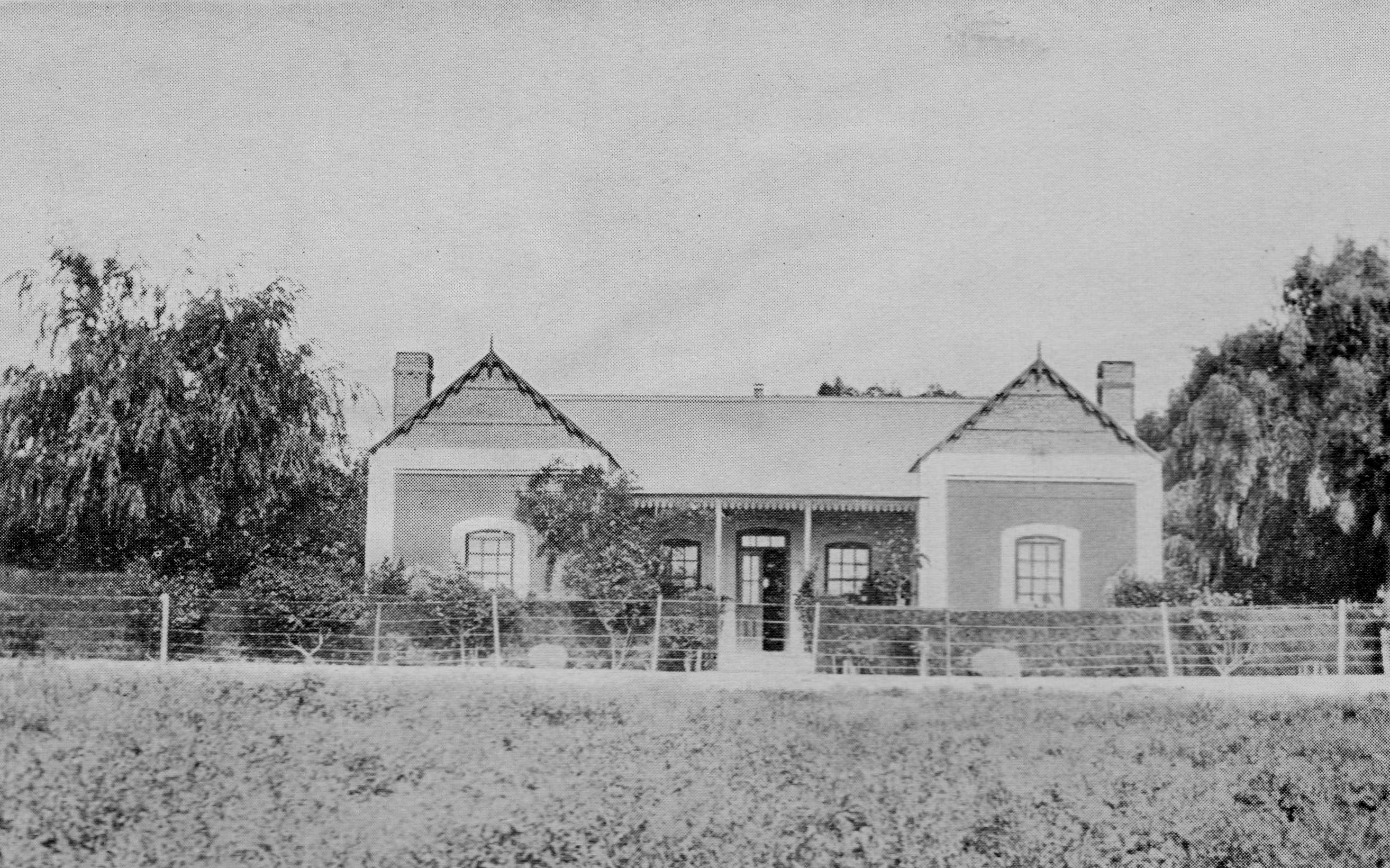 Amaethdy yn Nyffryn Camwy - Casa de campo en el Valle inferior del río Chubut.